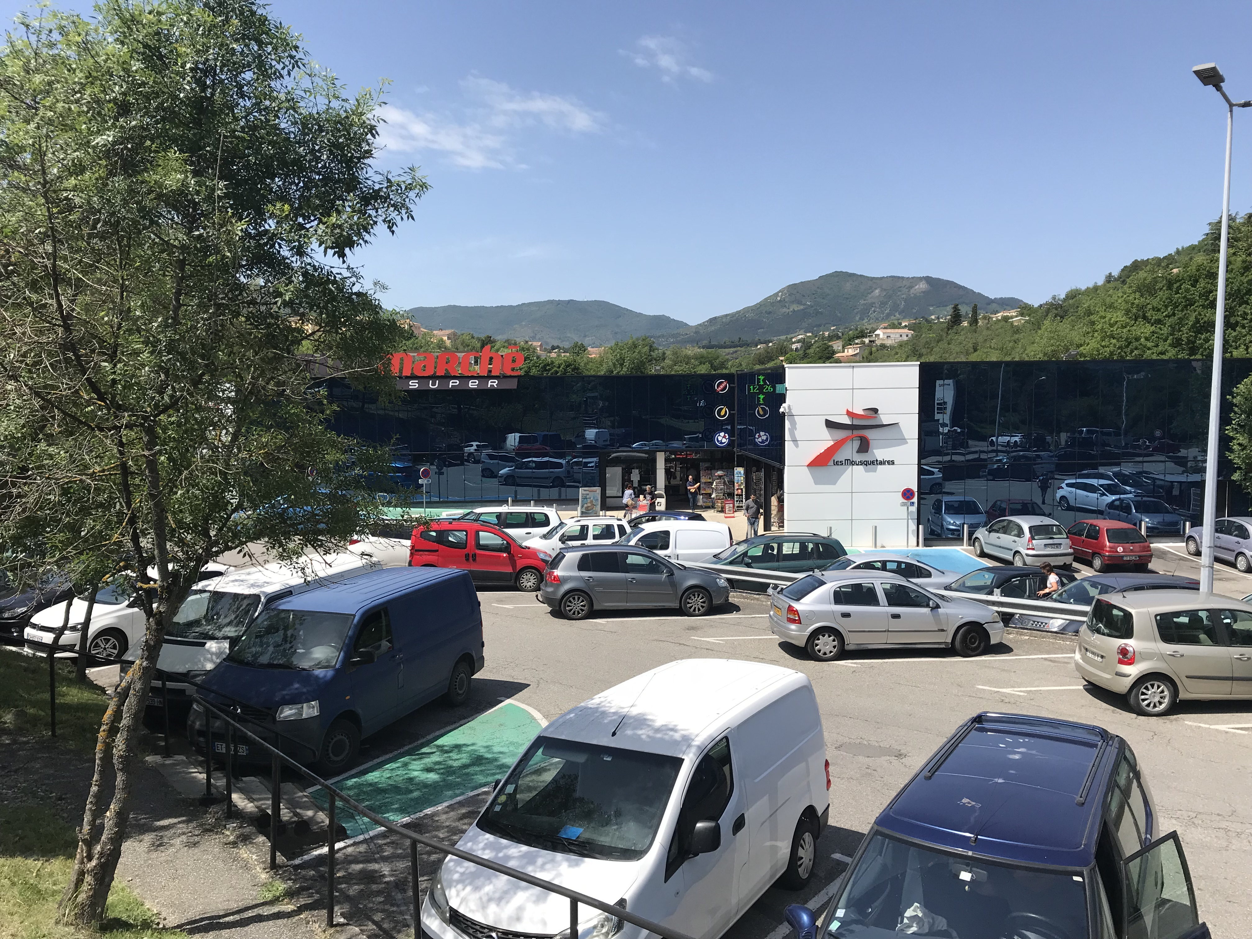 Image de Privas en Ardèche en France.